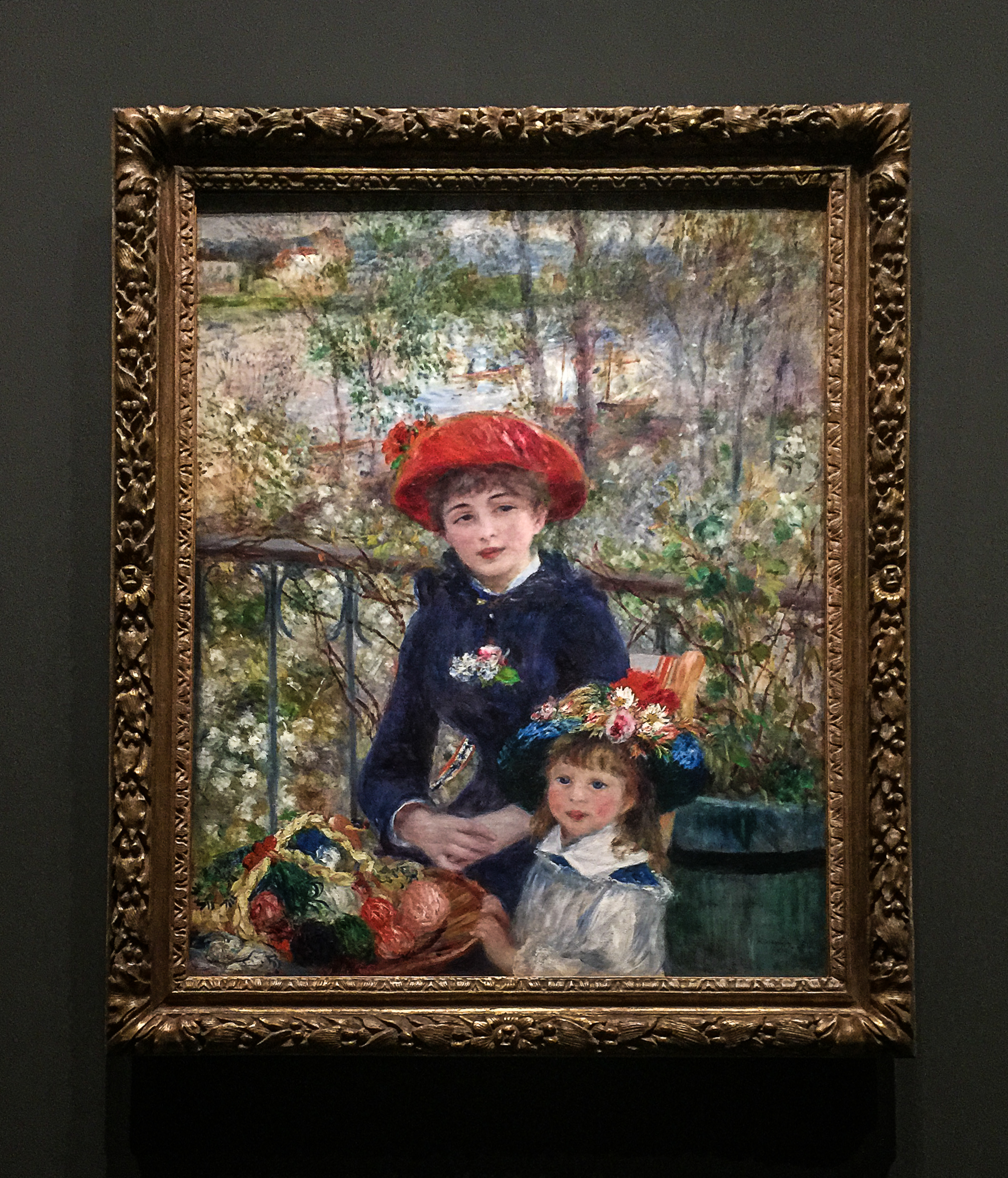 Paul Durand-Ruel, Le pari de l’impressionnisme - Exposition au musée du Luxembourg